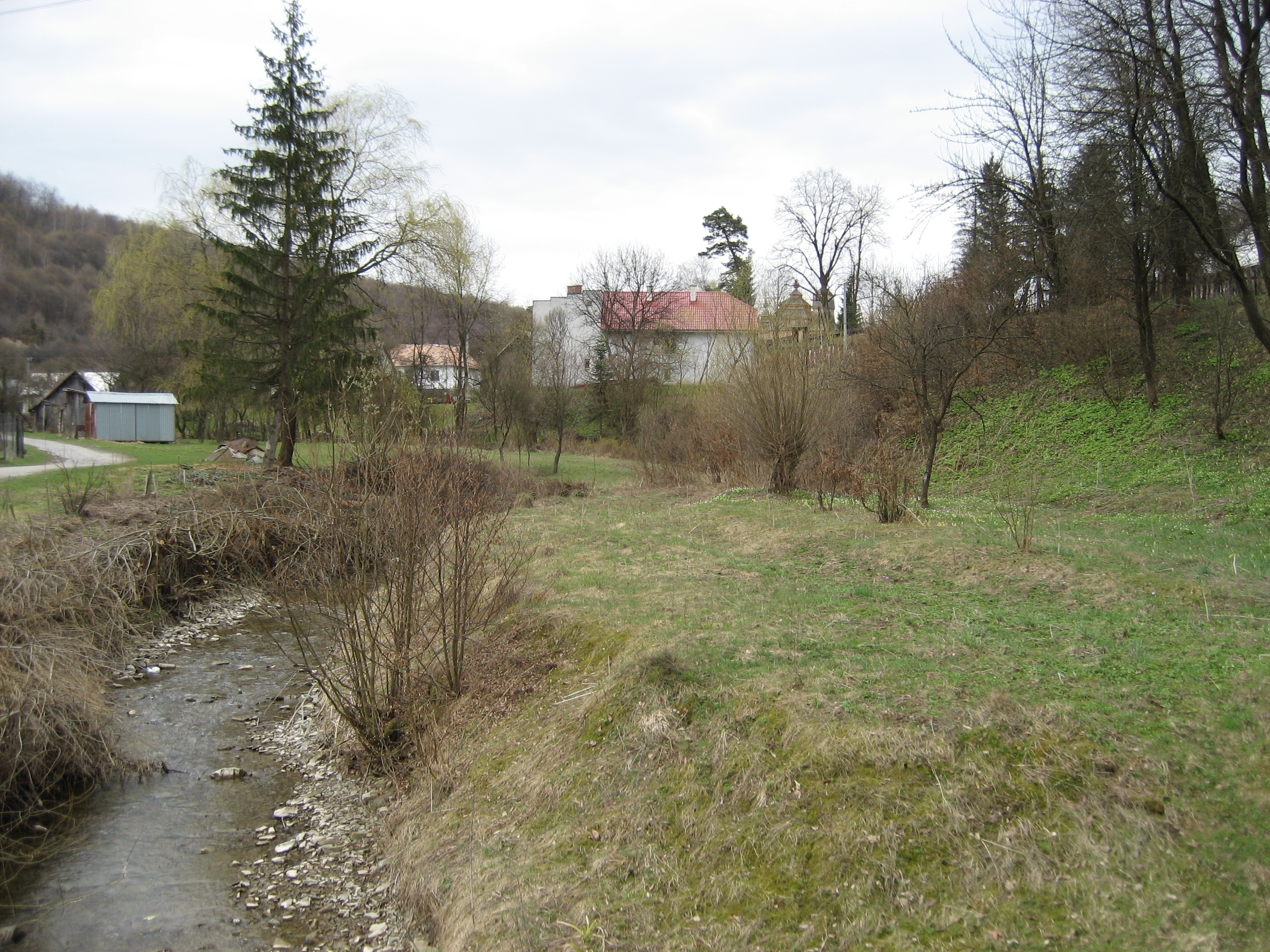 Bodružalík sa za posledných päťdesiat rokov hlboko zahryzol do okolitých brehov